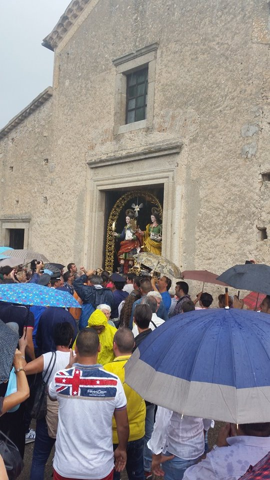 Festa dei Santi Medici Cosimo e Damiano 2014 a Riace (RC)